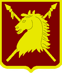 Герб области Сибирских киргизов